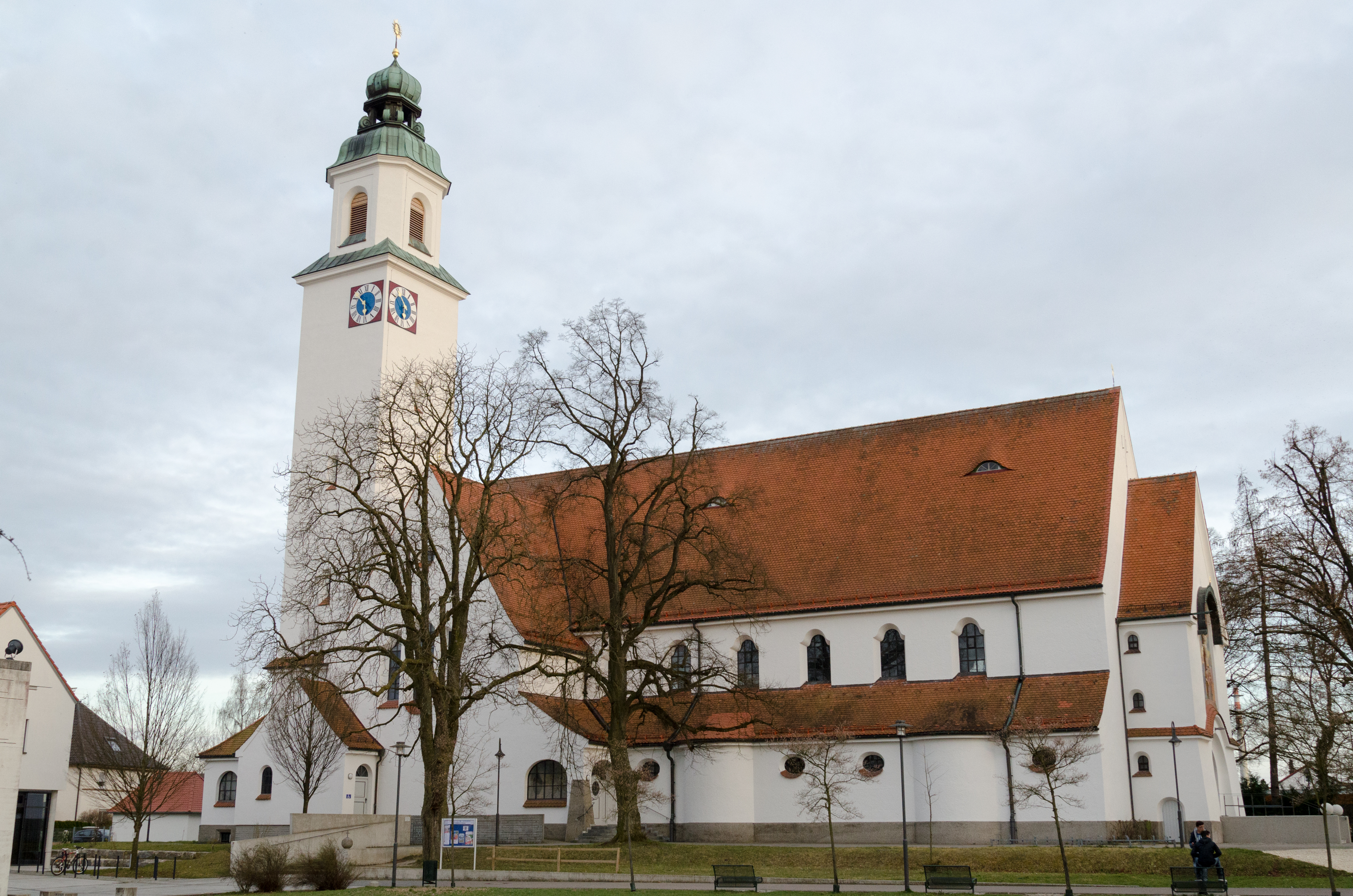 Vöhringen, Katholische Pfarrkirche St. Michael